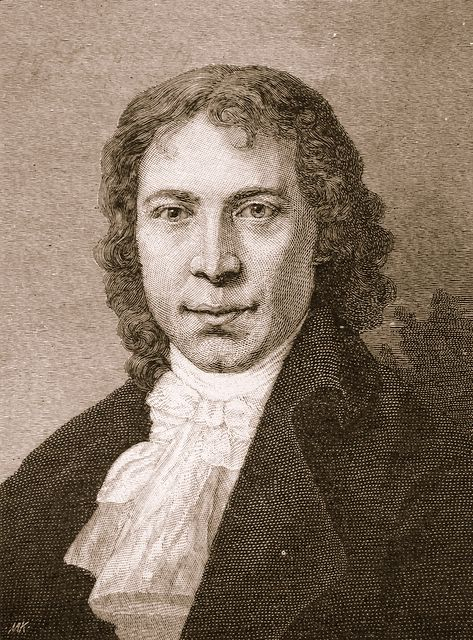 Gottlieb Schick, Der schwäbische Bildhauer Johann Heinrich Dannecker (1758-1841), Stuttgard, Staatsgalerie.